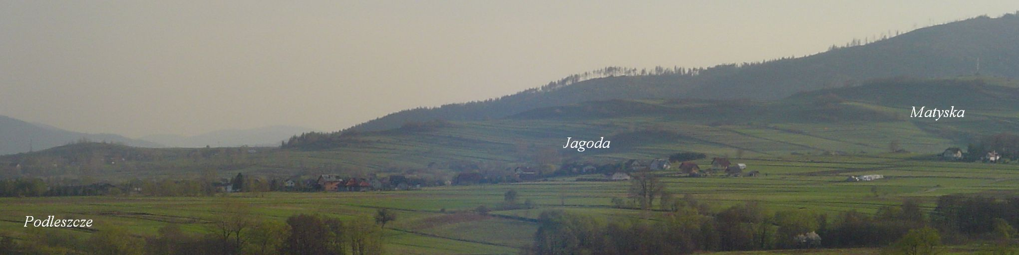 Wzgórza radziechowskie widziane z Dzielca: (od prawej) Matyska z Krzyżem Millenijnym, Jagoda i Podleszcze